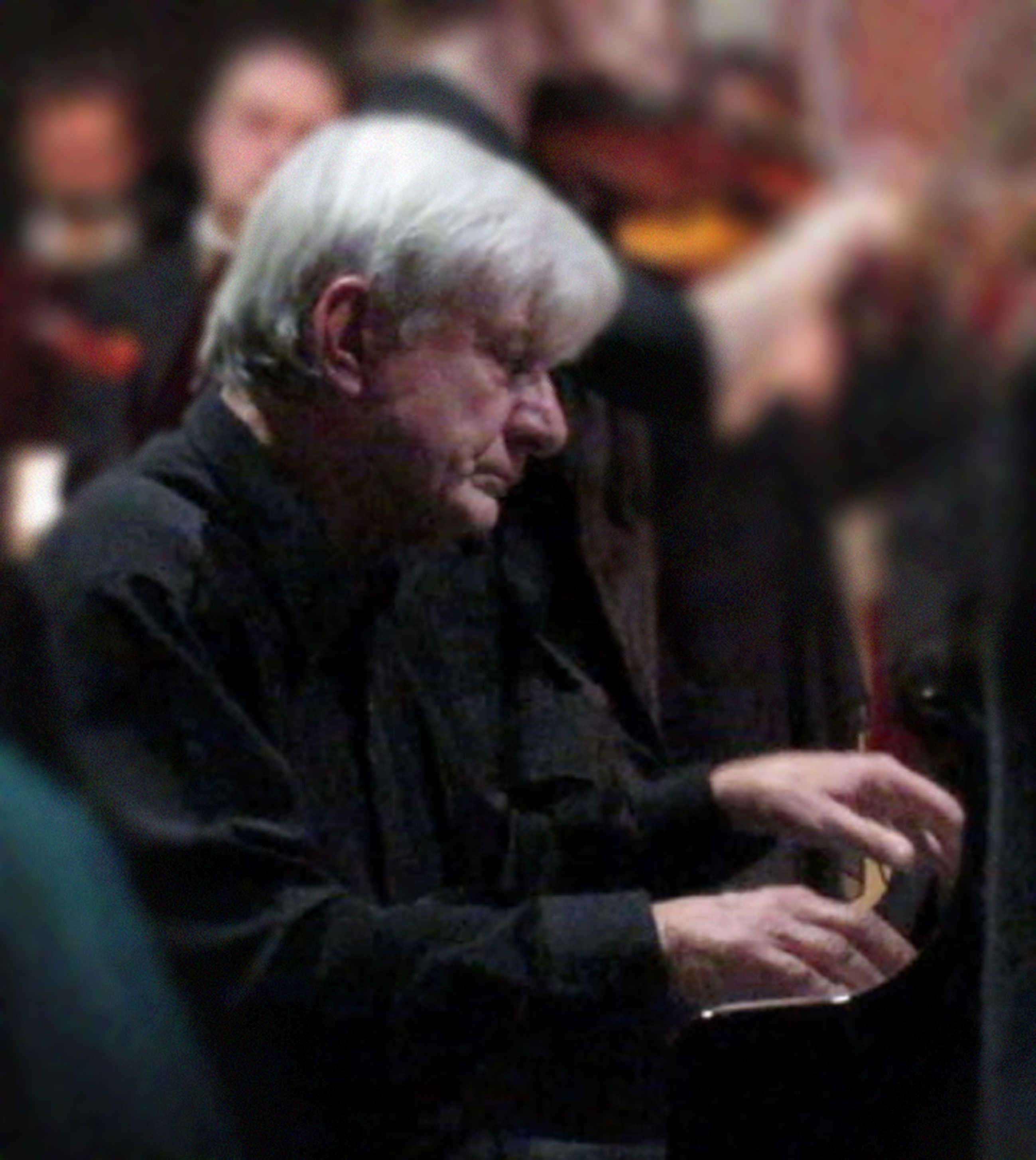 Peter Rösel im Konzert am 31.10.2015 in Dresden, Palais Großer Garten